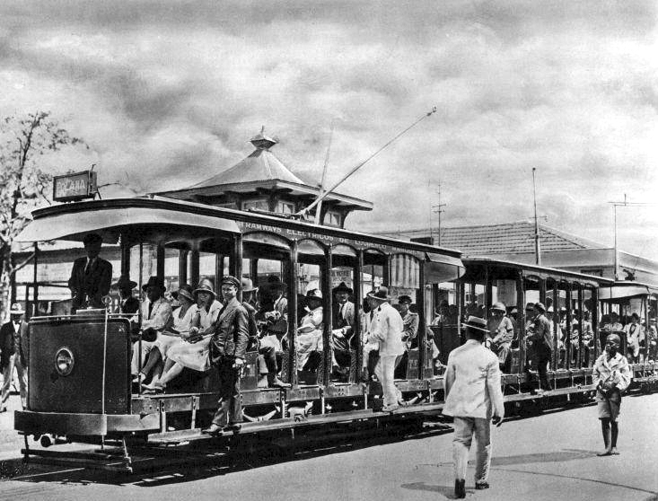 Maxibombo ferroviário elétrico urbano em Maputo (~1920).